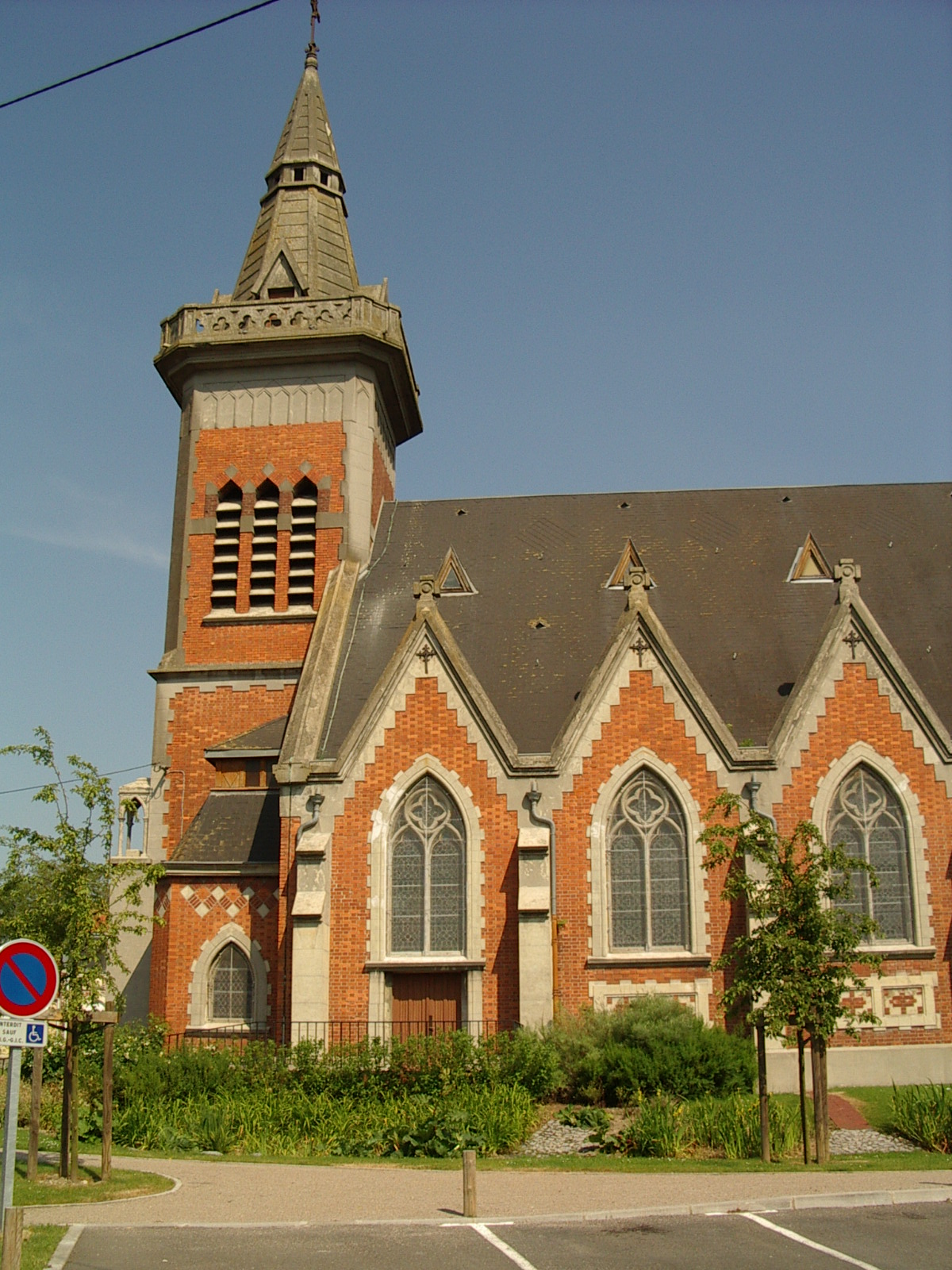 Eglise Saint Cyr Angres